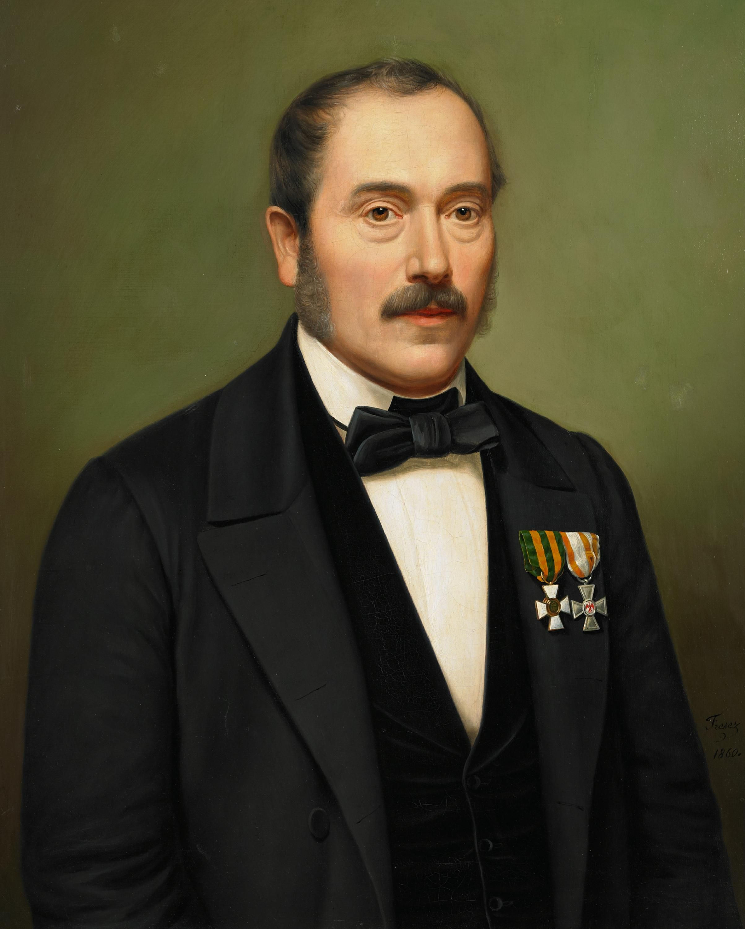 De Jean-Baptiste Fresez, Autoportrait vun 1860.